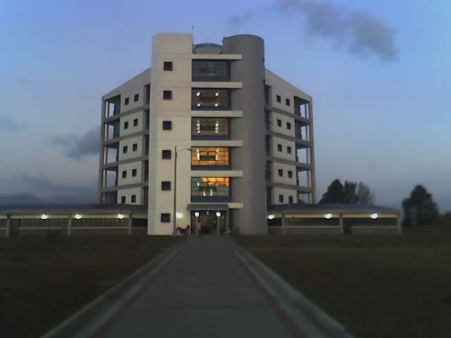 Es una fotografía del edificio de la Escuela de Ingeniería Eléctrica de la Universidad de Costa Rica, en la Ciudad de la Investigación, San José, capital de Costa Rica.